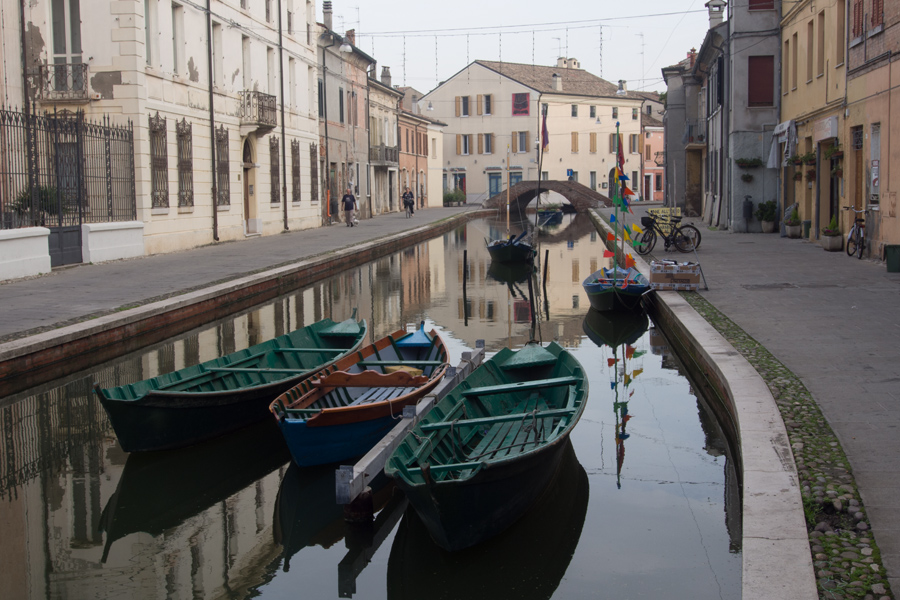 Centro storico di Comacchio e i suoi ponti This is a photo of a monument which is part of cultural heritage of Italy.